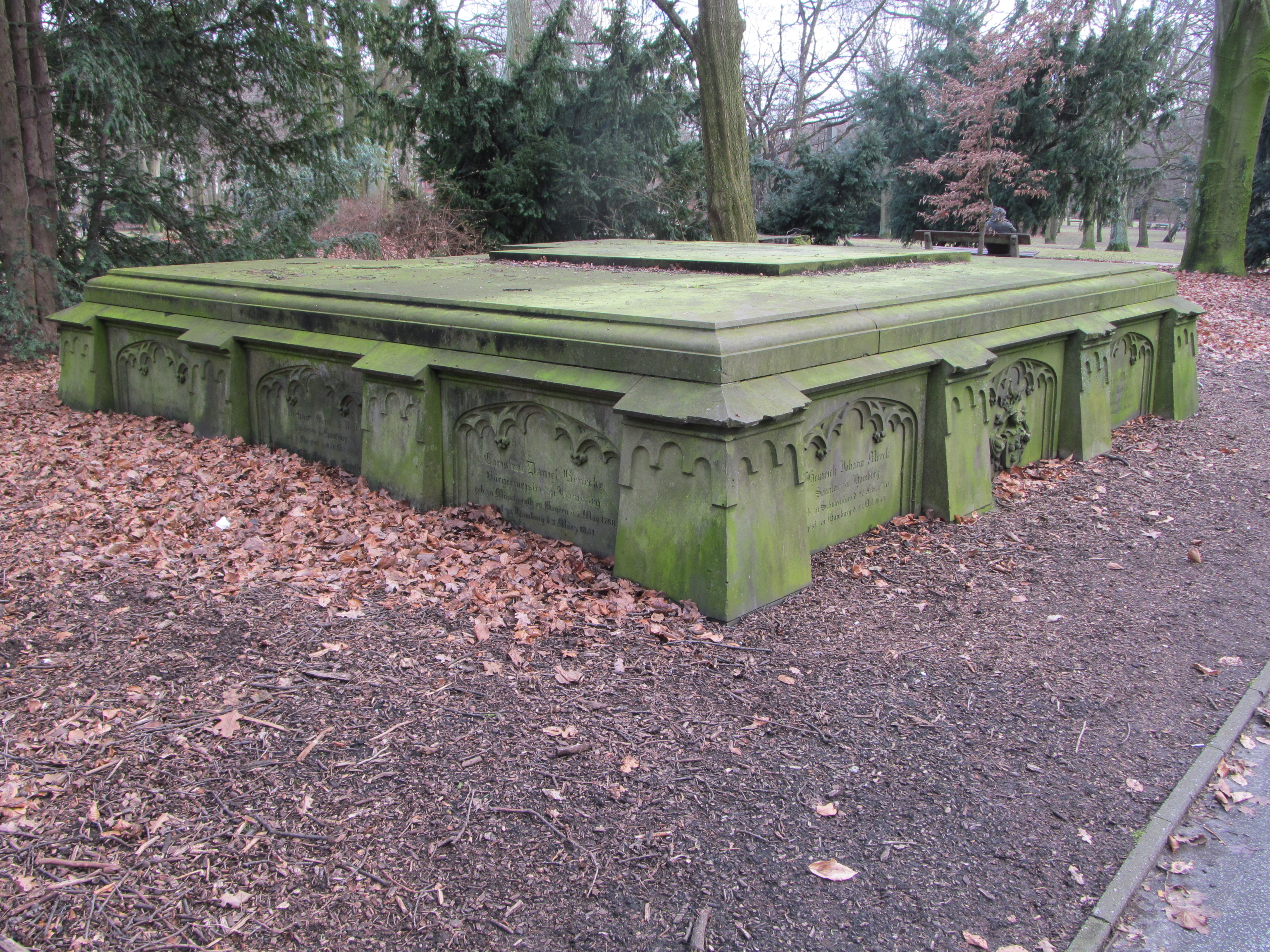 Familiengrabmal Merck im Jacobipark in Hamburg-Eilbek, Ansicht von Nordwesten This is a photograph of an architectural monument.